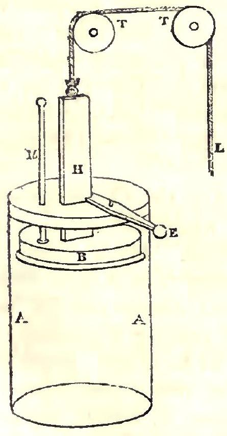 ドニ・パパンの蒸気機関原理図